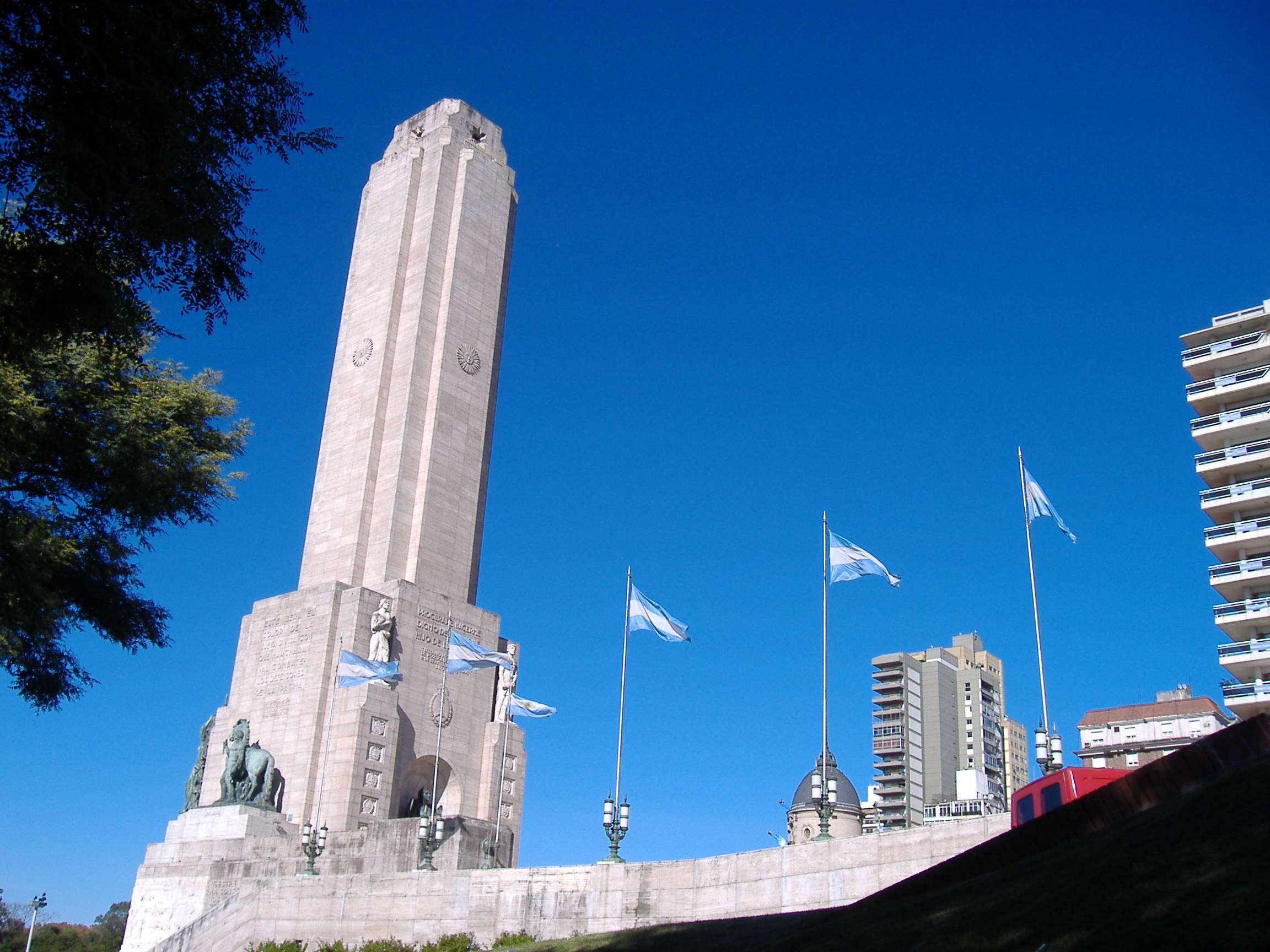 National Flag Memorial, Rosario, Argentina